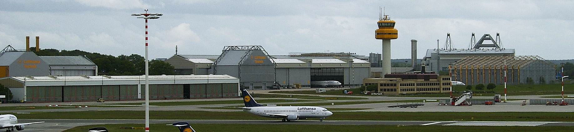 Lufthansa Technik-Werft in Hamburg-Fuhlsbüttel.